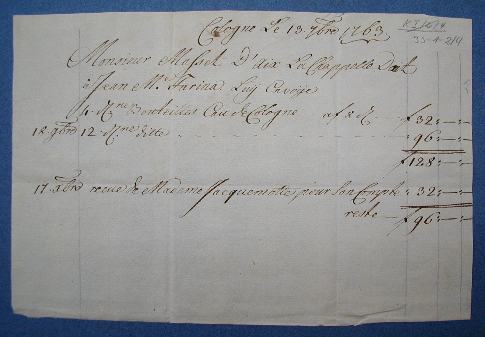 Verkaufsrechnung des Hauses Johann Maria Farina gegenüber dem Jülichs-Platz, Köln aus dem Jahr 1763